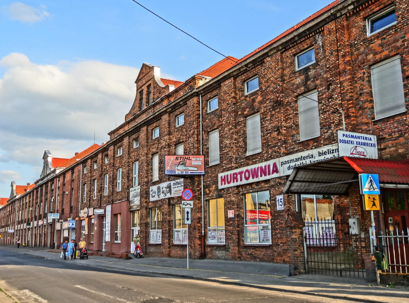 Ulica Chocimska w Bydgoszczy